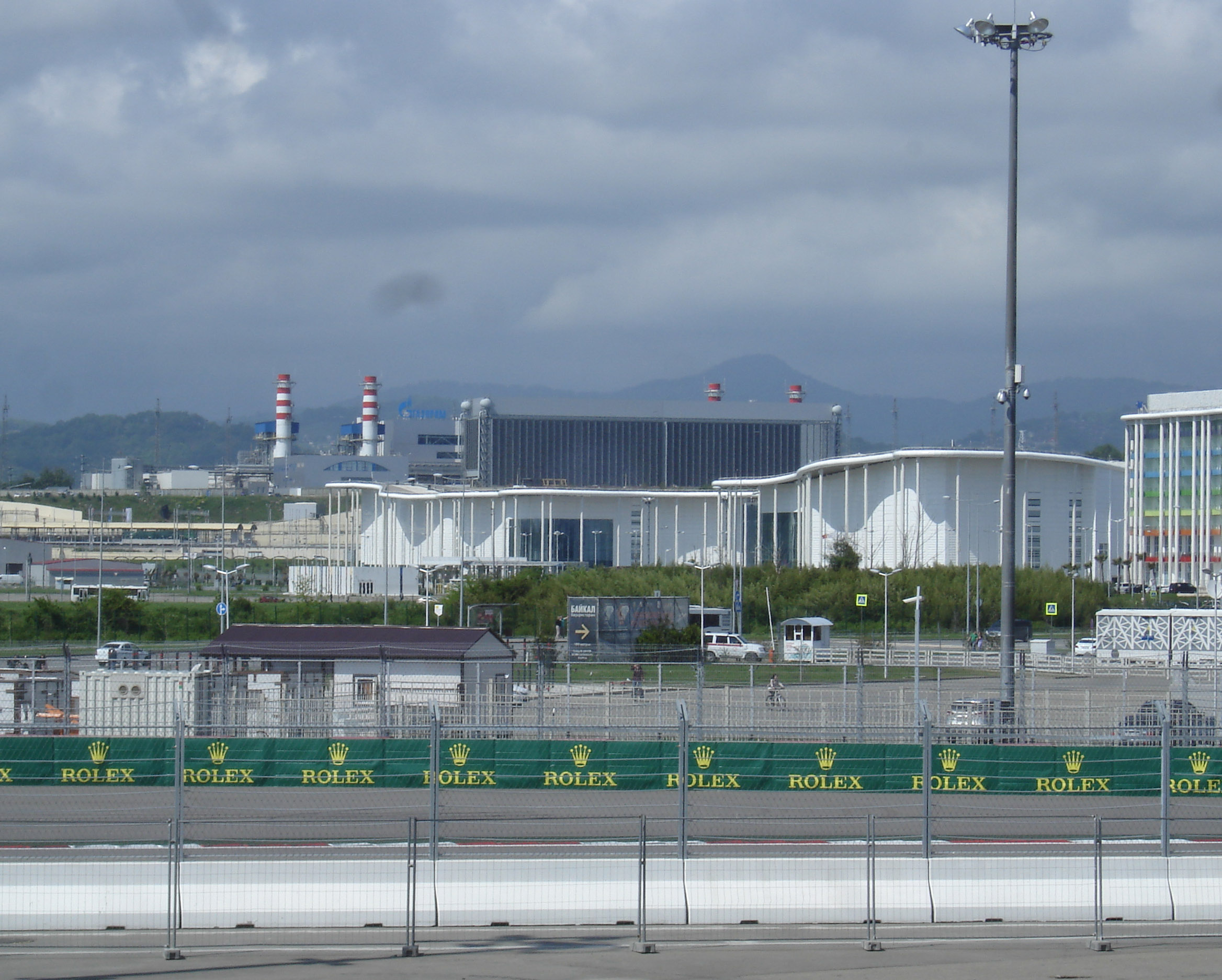 Адлерская ТЭС, вид из Олимпийского парка Сочи